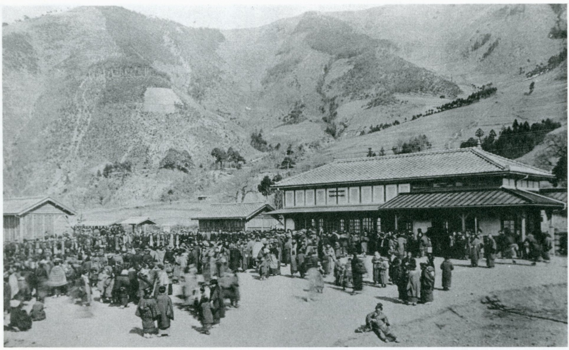 開業当日の戸倉駅。出典書籍に撮影年月日の記述は無いが、日本国有鉄道百年史第5巻では開業当日と書かれている。